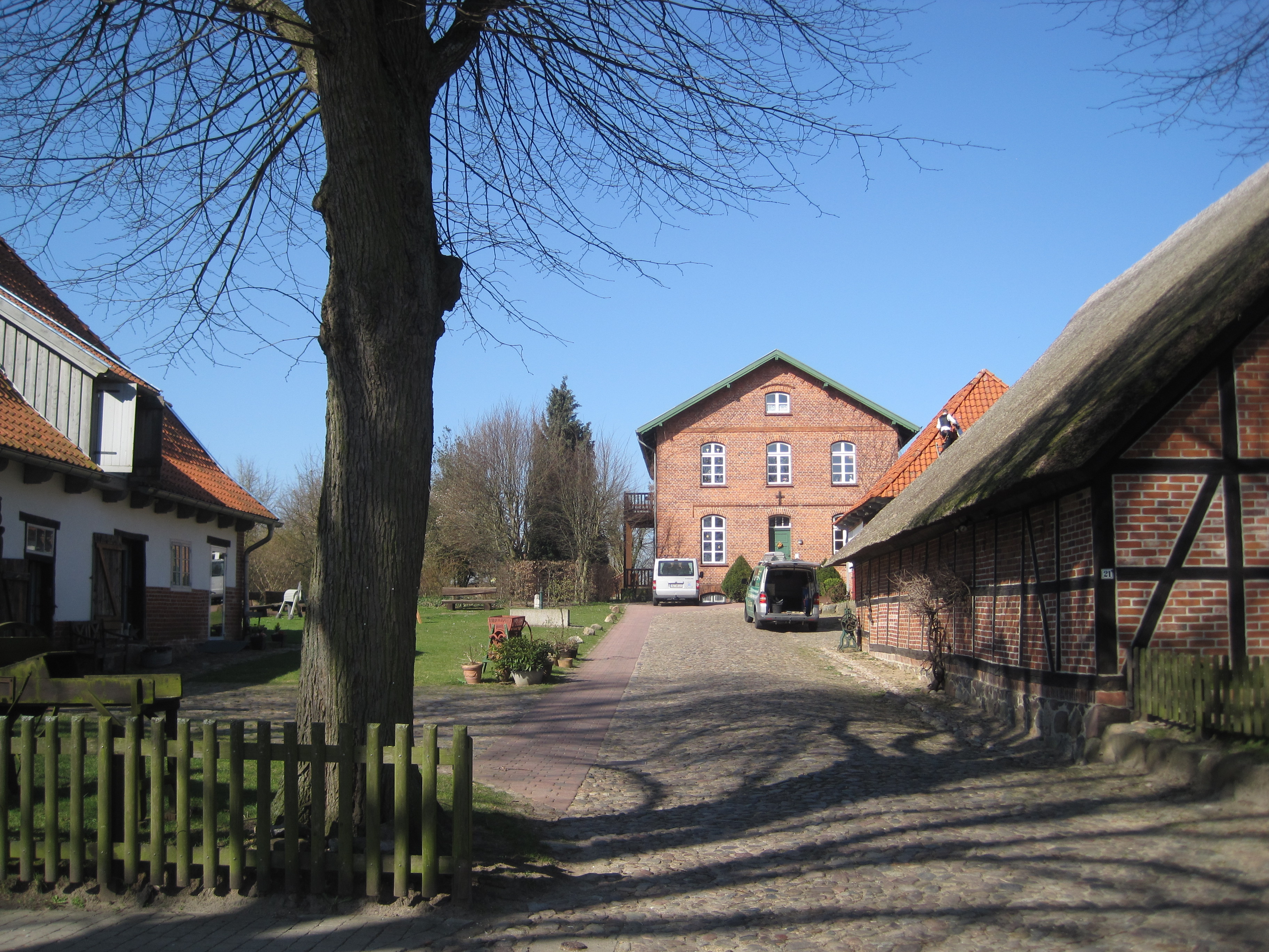 Pfarrhof in Ziethen (Lauenburg)